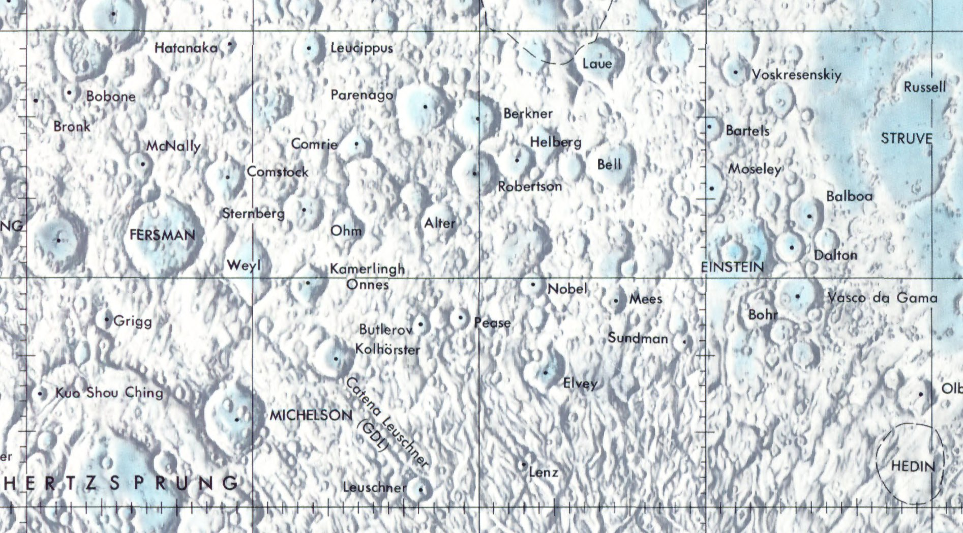 Cráter lunar Alter. Localización. (Lunar Chart LPC1. Second Edition)